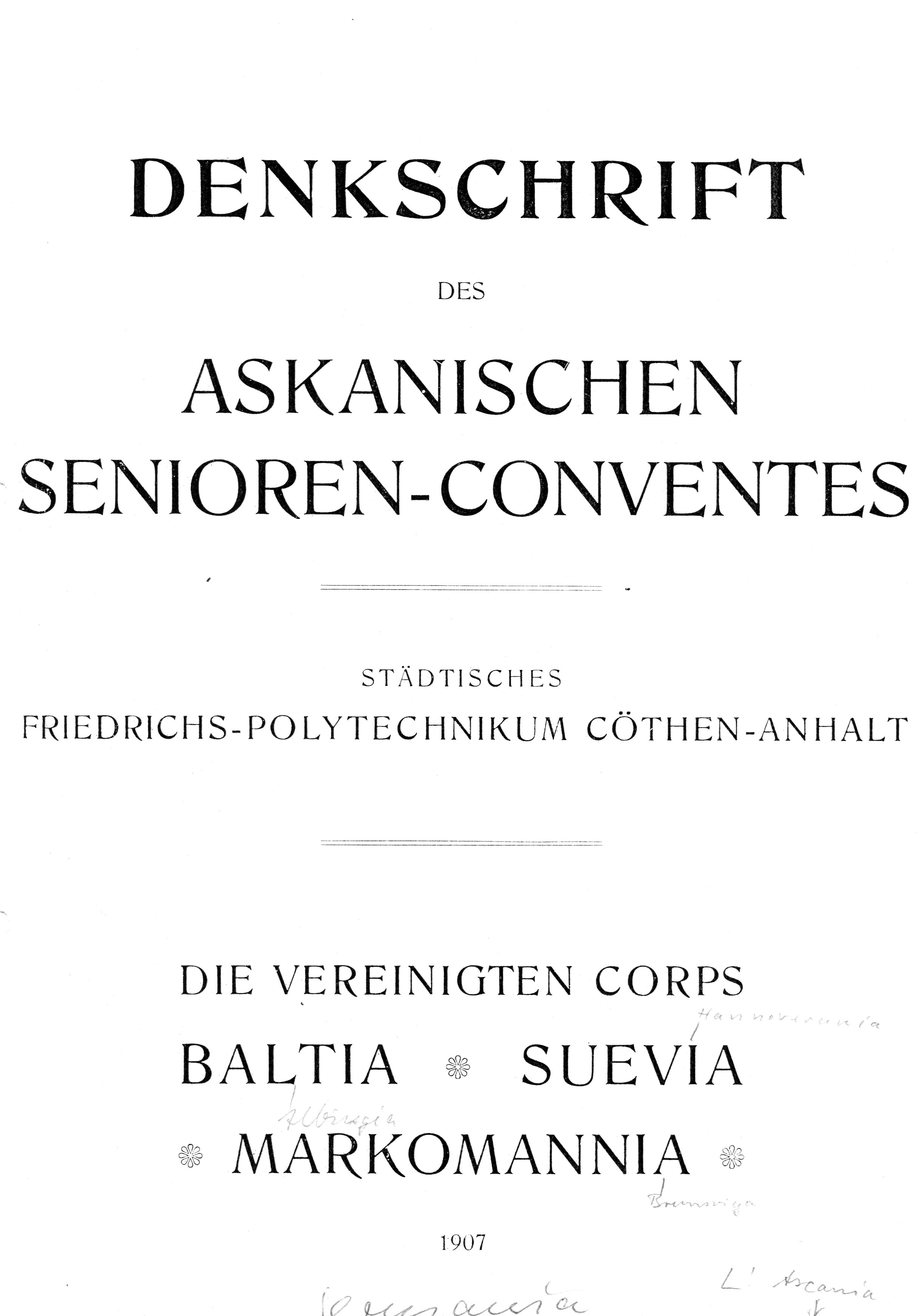 Deckblatt der Denkschrift des Askanischen Senioren-Convents zur Entwicklung des Friedrichs-Polytechnikums